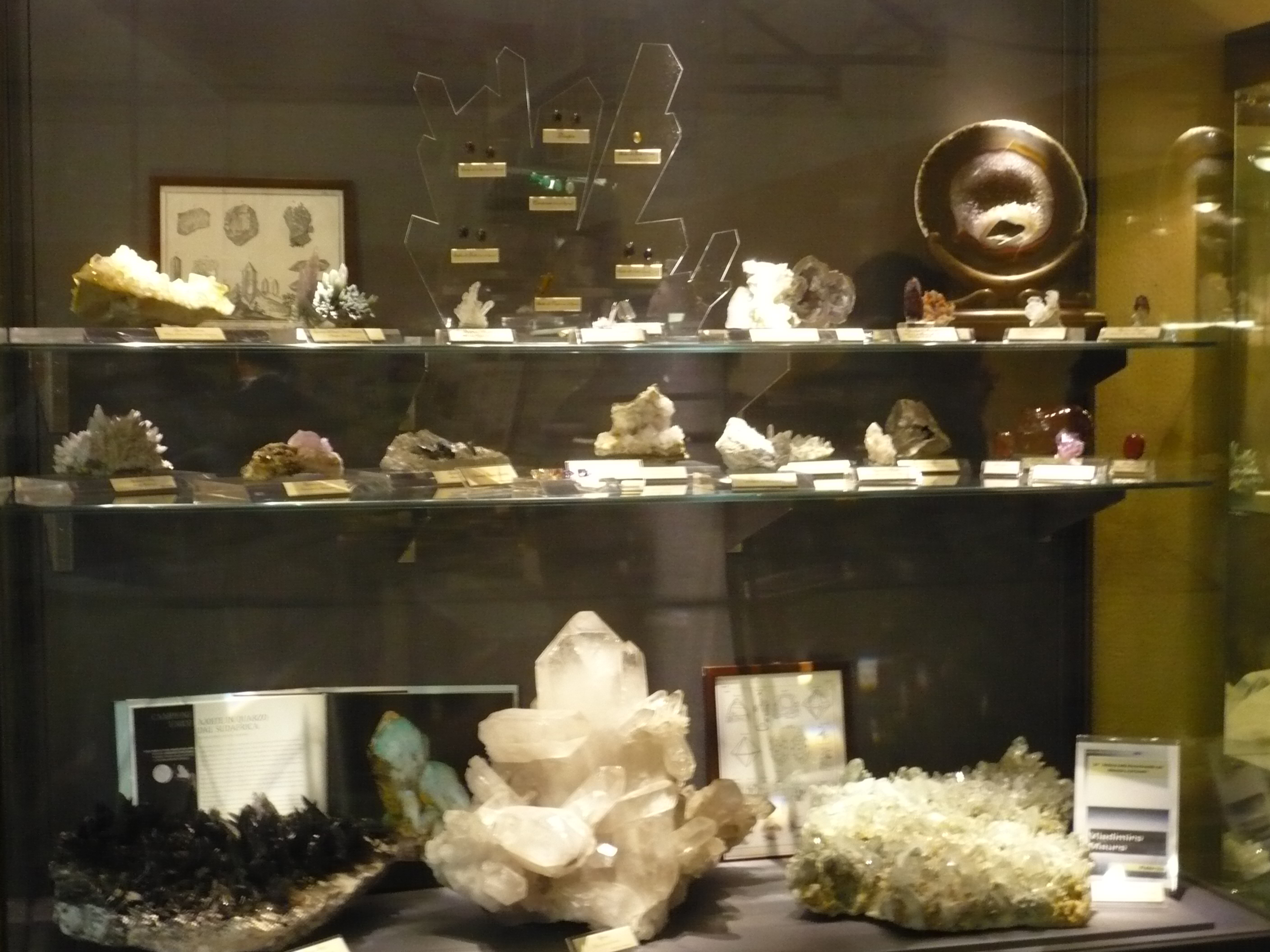 Vetrina di quarzi. Vincitore come miglior vetrina di quazi della 36ma Mostra concorso del minerale di Caltanissetta nei Locali del Museo Mottura